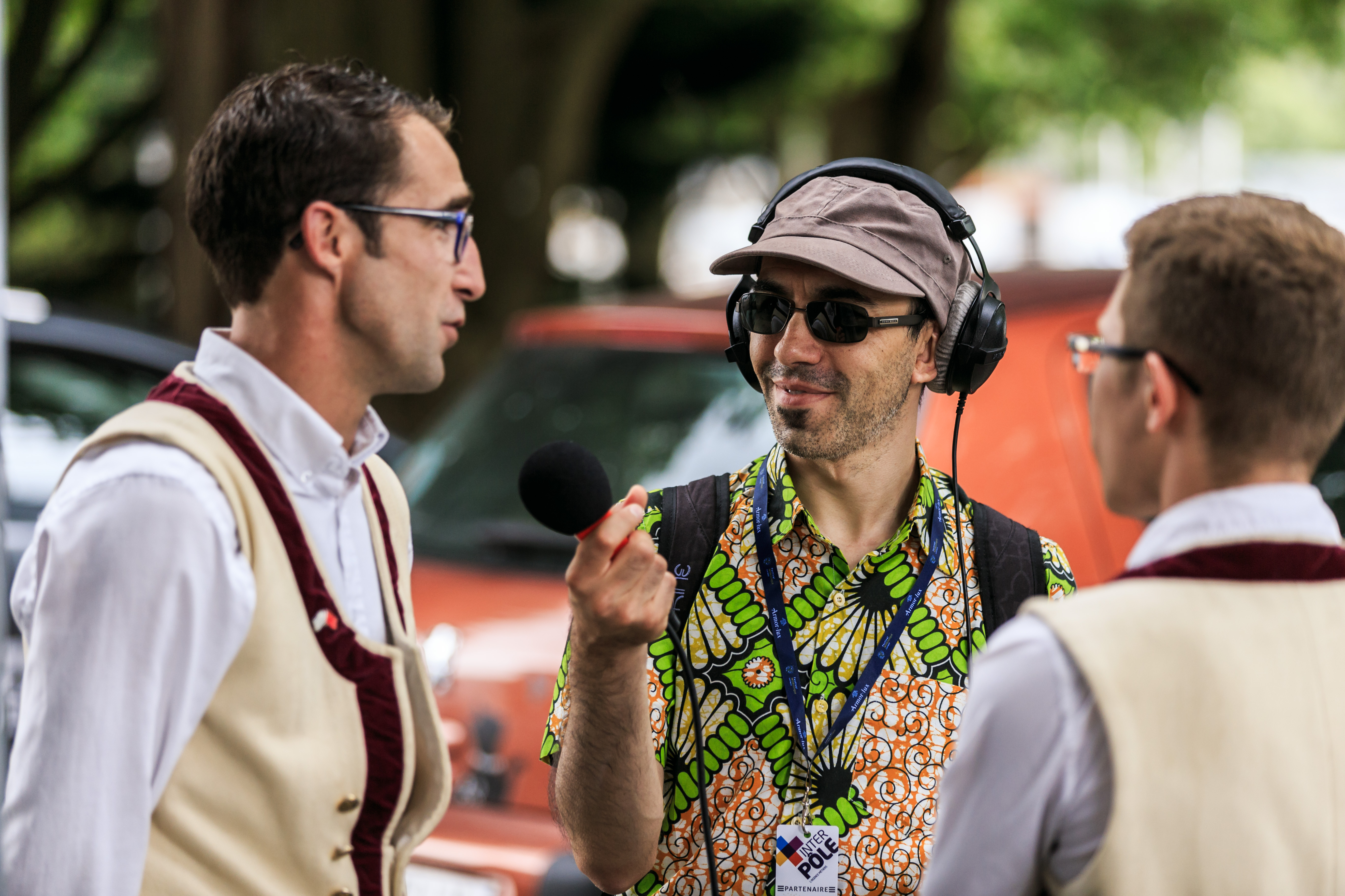 Épreuve d'été du Championnat national des bagadoù de Première catégorie organisée au stade du Moustoir dans le cadre du Festival Interceltique de Lorient en Bretagne.